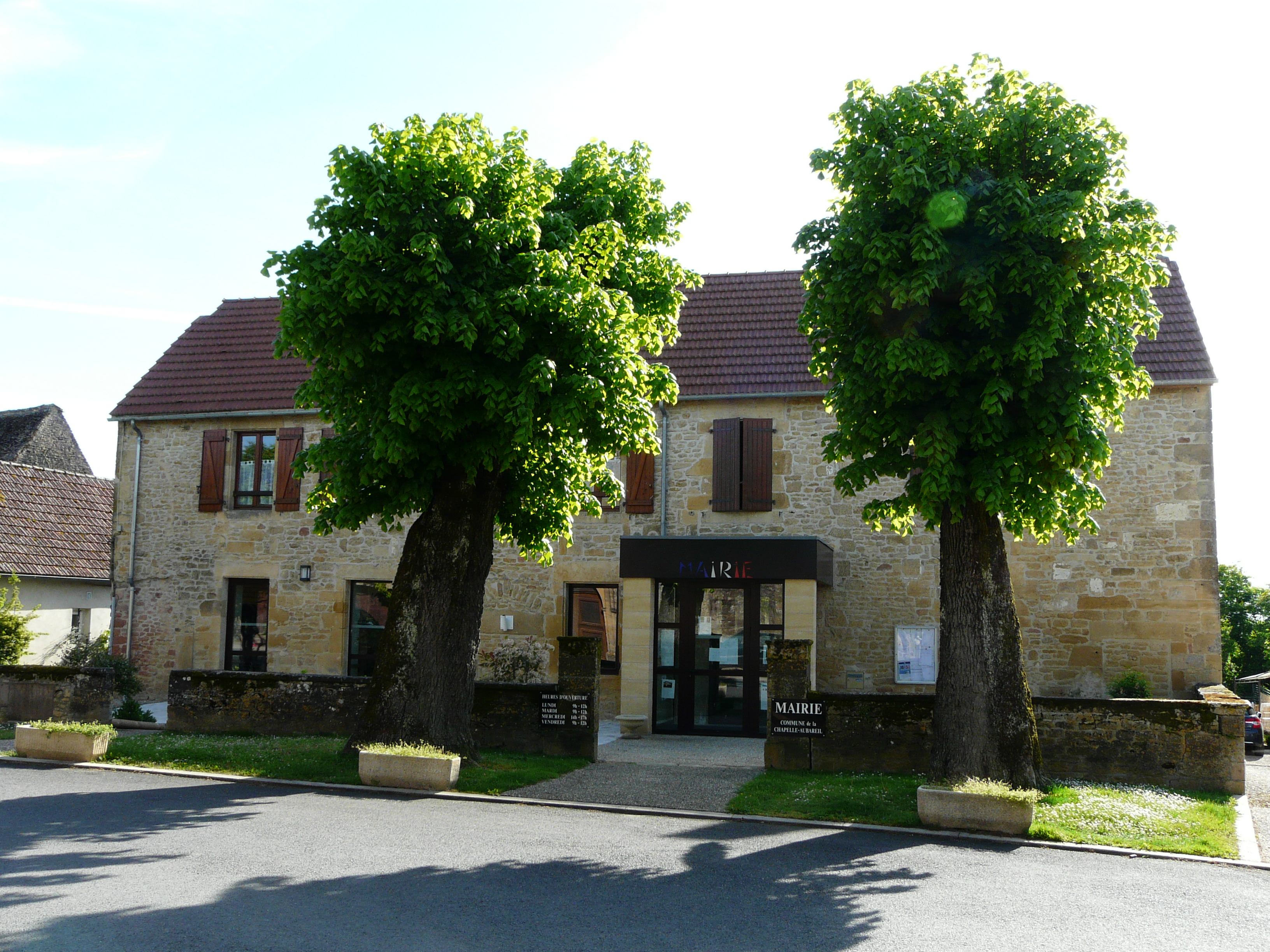 La mairie de La Chapelle-Aubareil, Dordogne, France.